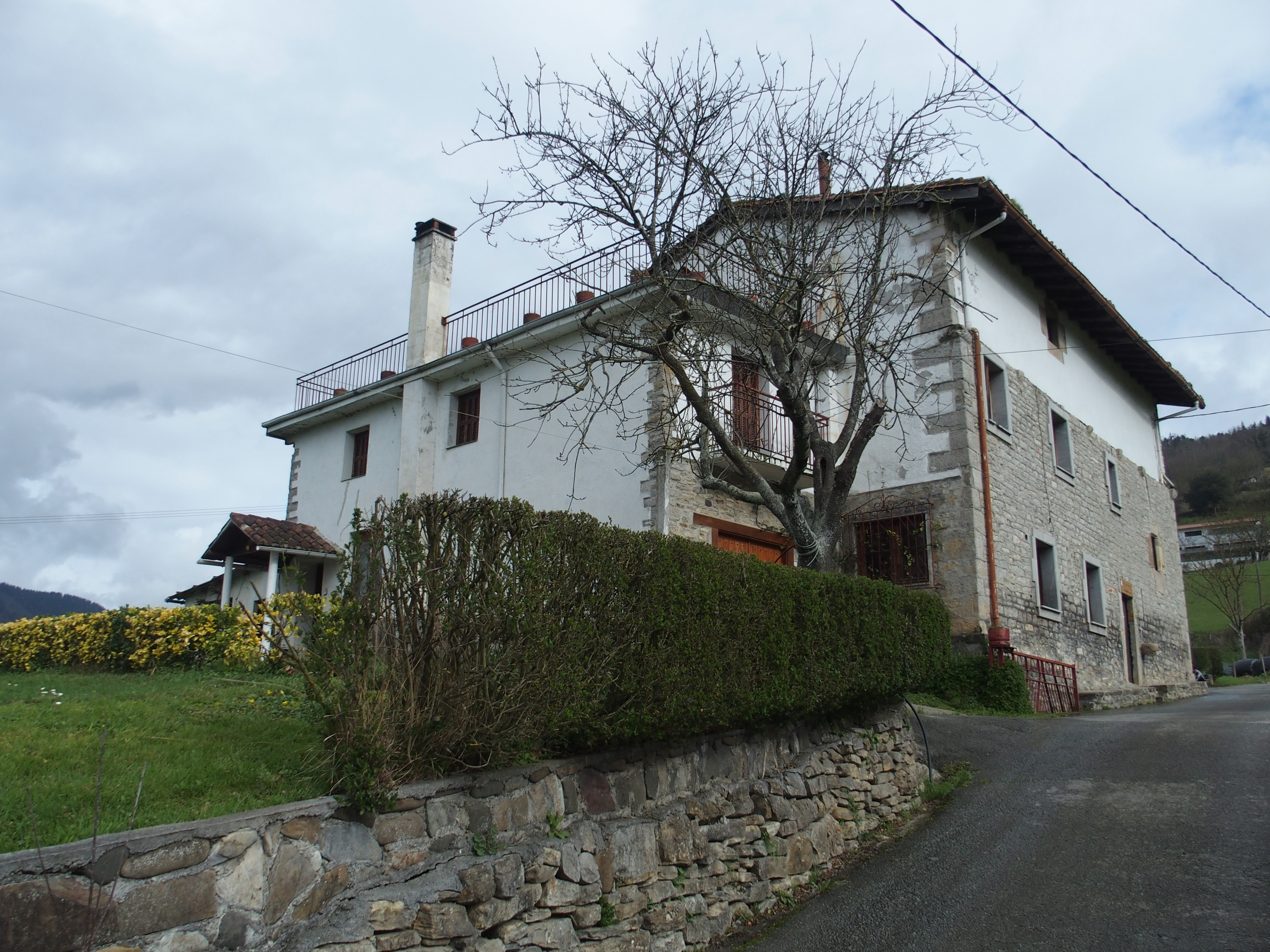 San Blas ermita eta baserria